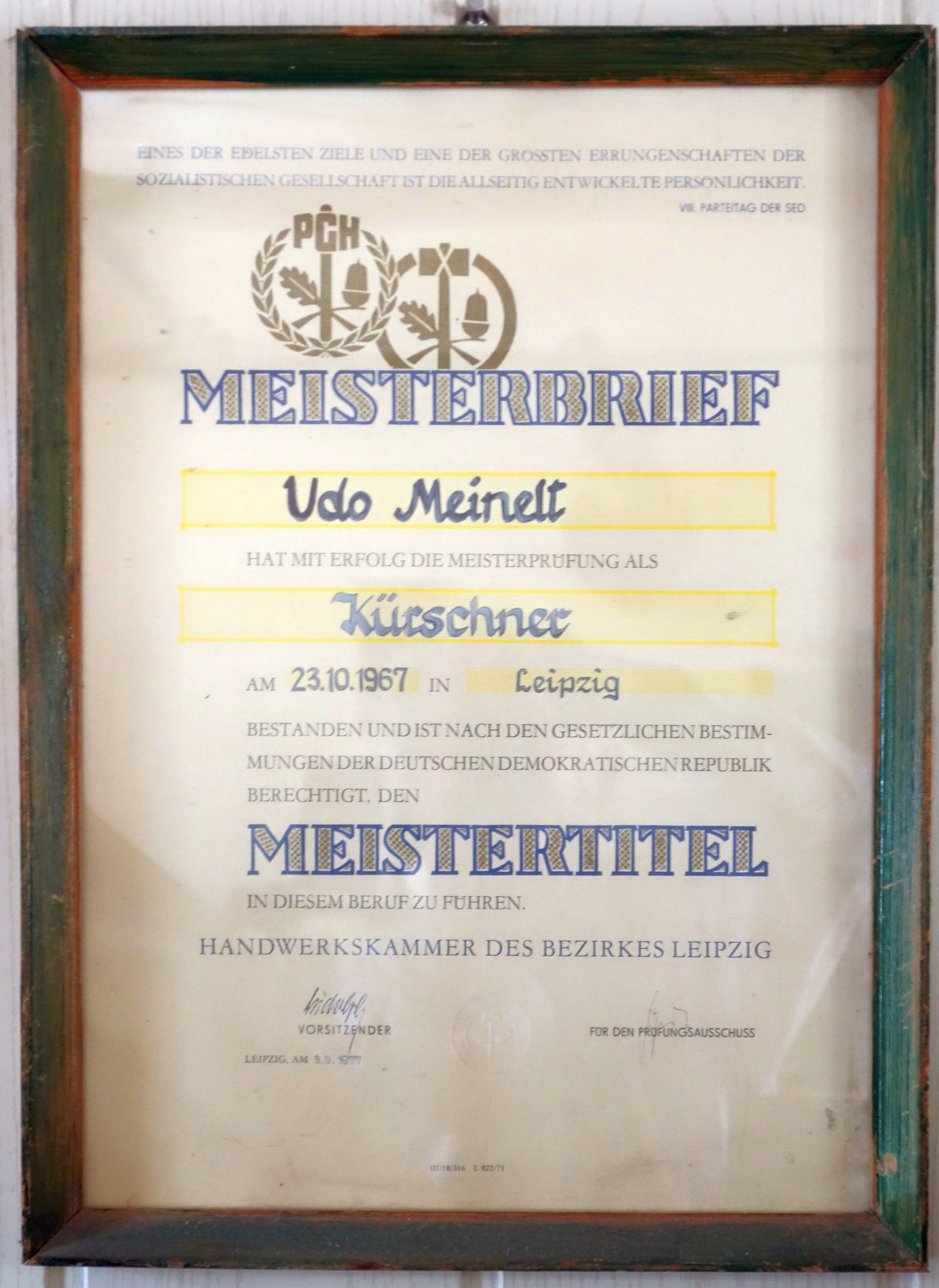 Meisterbrief vom 23. Oktober 1967 für das Kürschnerhandwerk der Handwerkskammer des Bezirks Leipzig für Udo Meinelt.